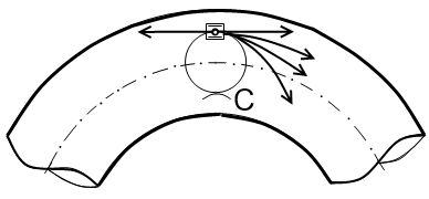 Betatron scheme